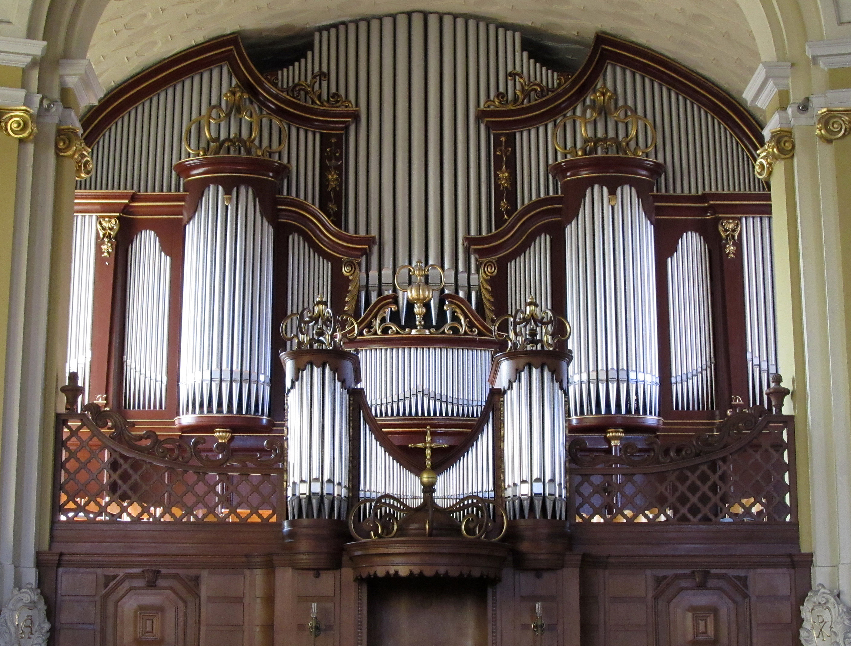 Orgelprospekt in der evangelischen Versöhnungskirche in Völklingen, Saarland